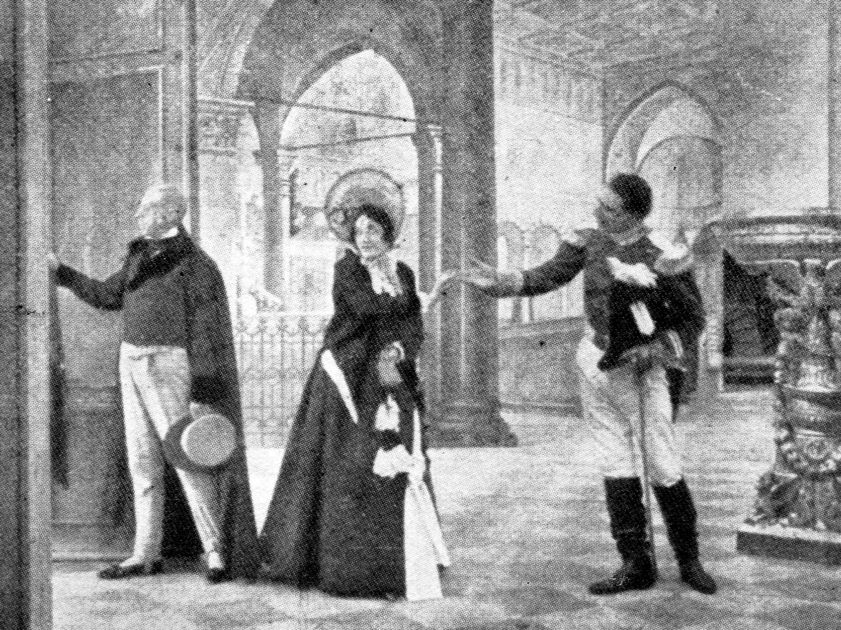 Il pianoforte silenzioso - regia di Luigi Maggi - produz "Ambrosio film" Torino - 1910 - foto di scena